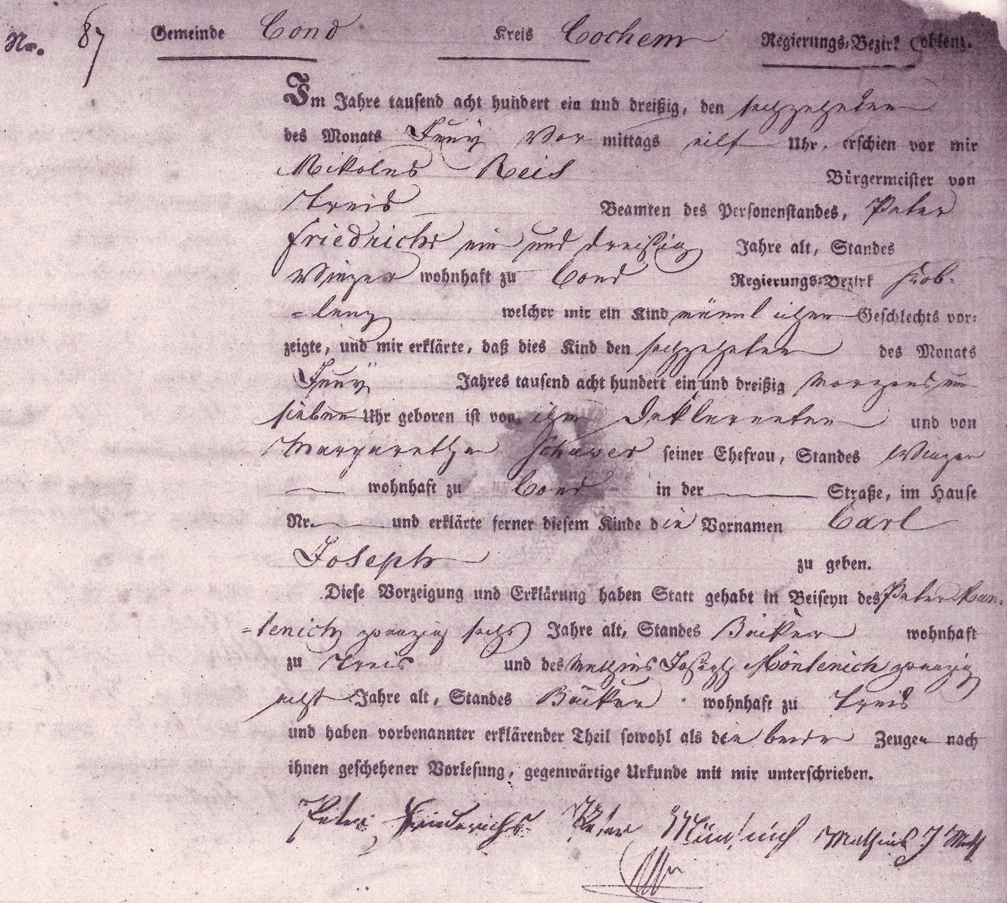 Geburtsurkunde